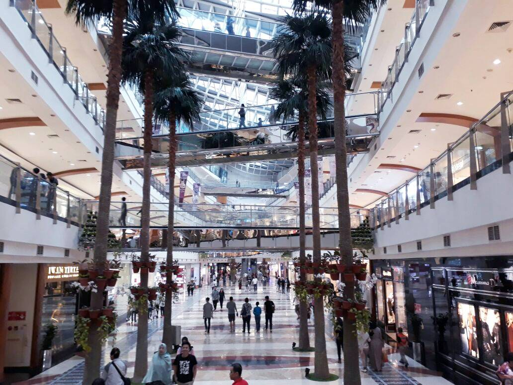 Tampak dalam Pondok Indah Mall 2